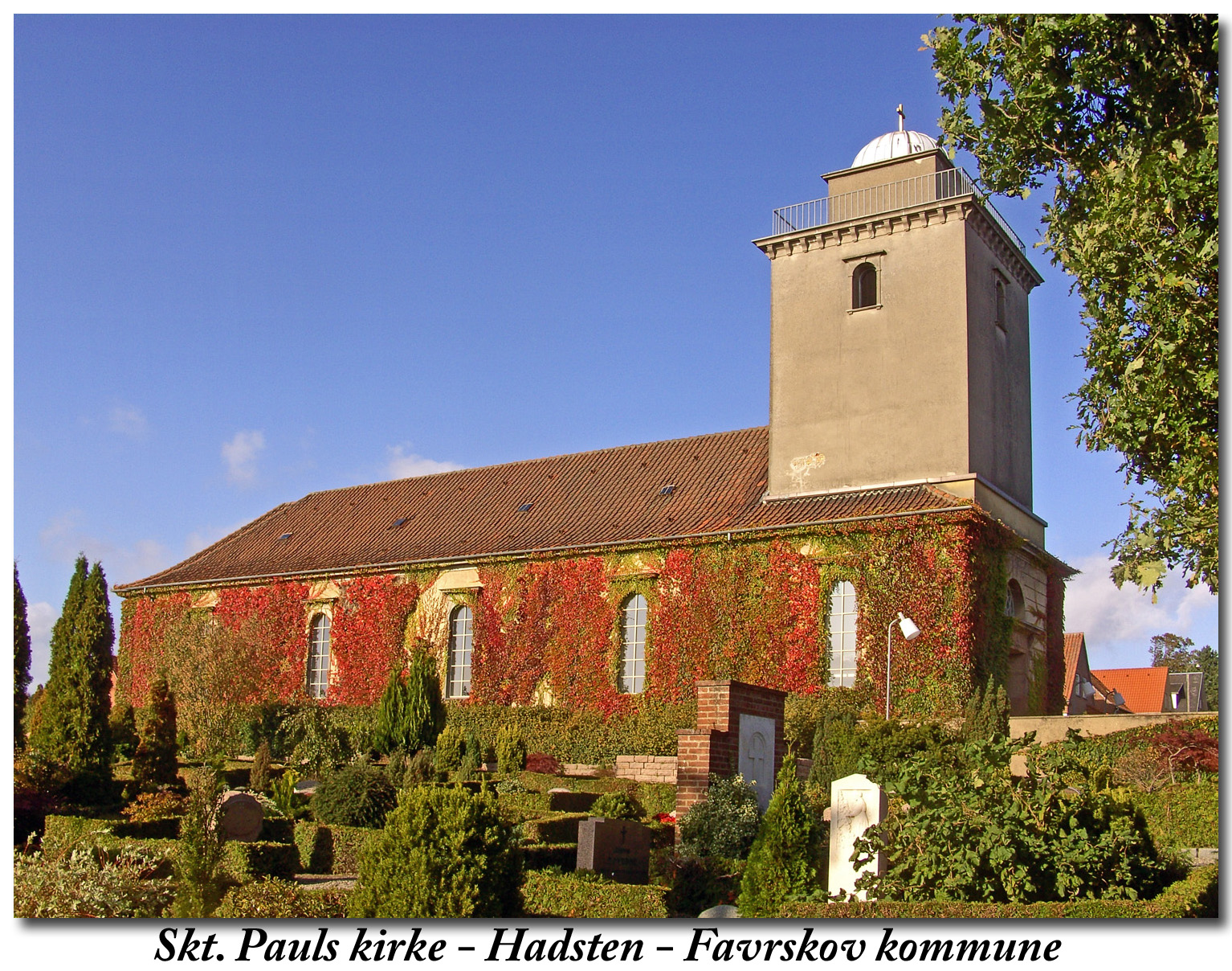 fra sydøst